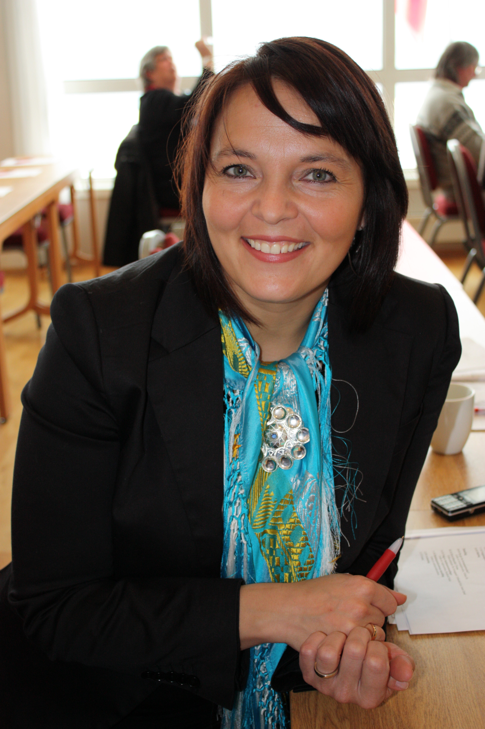 Barbro Lill Hætta-Jakobsen, Harstad Ap